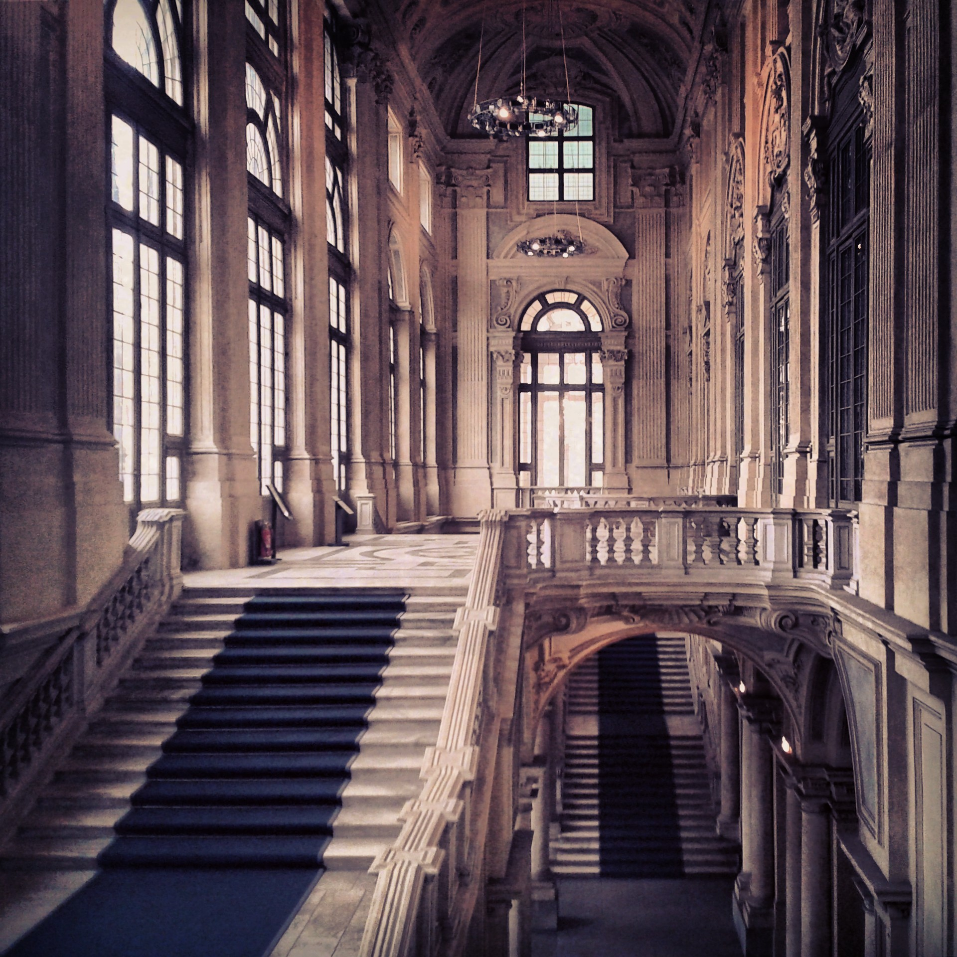 Palazzo Madama This is a photo of a monument which is part of cultural heritage of Italy.